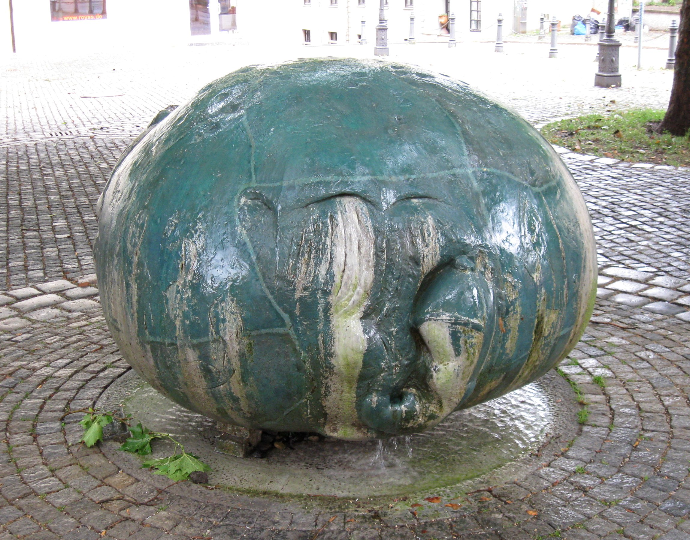 Spitzweg-Brunnen, Stephansplatz 3, 1980 von Konstantin Frick, München